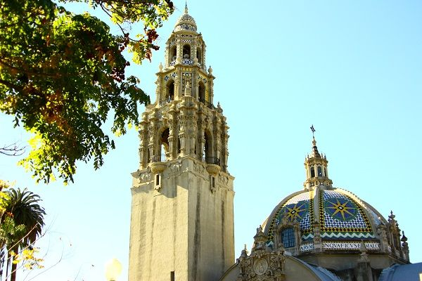 バルボアパーク